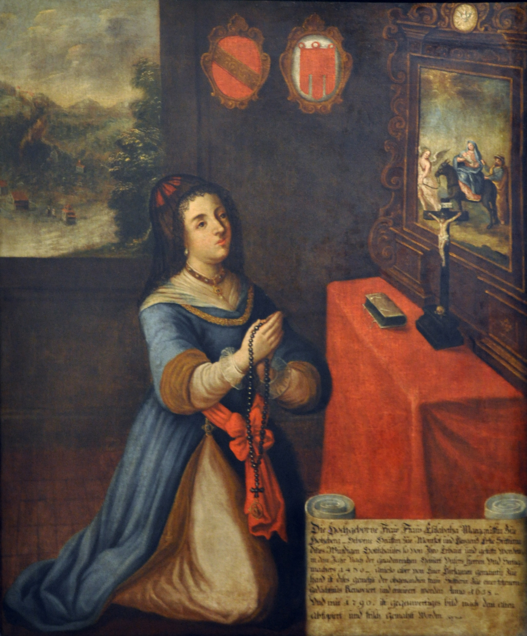 Bregenz, Vorarlberg Museum, Stifterbild der Elisabetha von Hachberg-Sausenberg (bzw. Hochberg / Baden), geb. Gräfin von Montfort und Bregenz, Öl auf Leinwand, 1790 Gräfin Elisabetha († 1458) als Stifterin der Kirche in Hard (irreführend, da die Kirche von Bürgern bezahlt wurde) Vorarlberg museum Native namevorarlberg museumLocationBregenz, Vorarlberg, AustriaCoordinates47° 30′ 15.84″ N, 9° 44′ 48.01″ E Established1857Web pageVorarlberg Museum websiteAuthority control : Q2533480 VIAF: 124303291 ISNI: 0000 0001 2242 622X LCCN: n50051186 GND: 18871-2 SUDOC: 030717523 WorldCat institution QS:P195,Q2533480